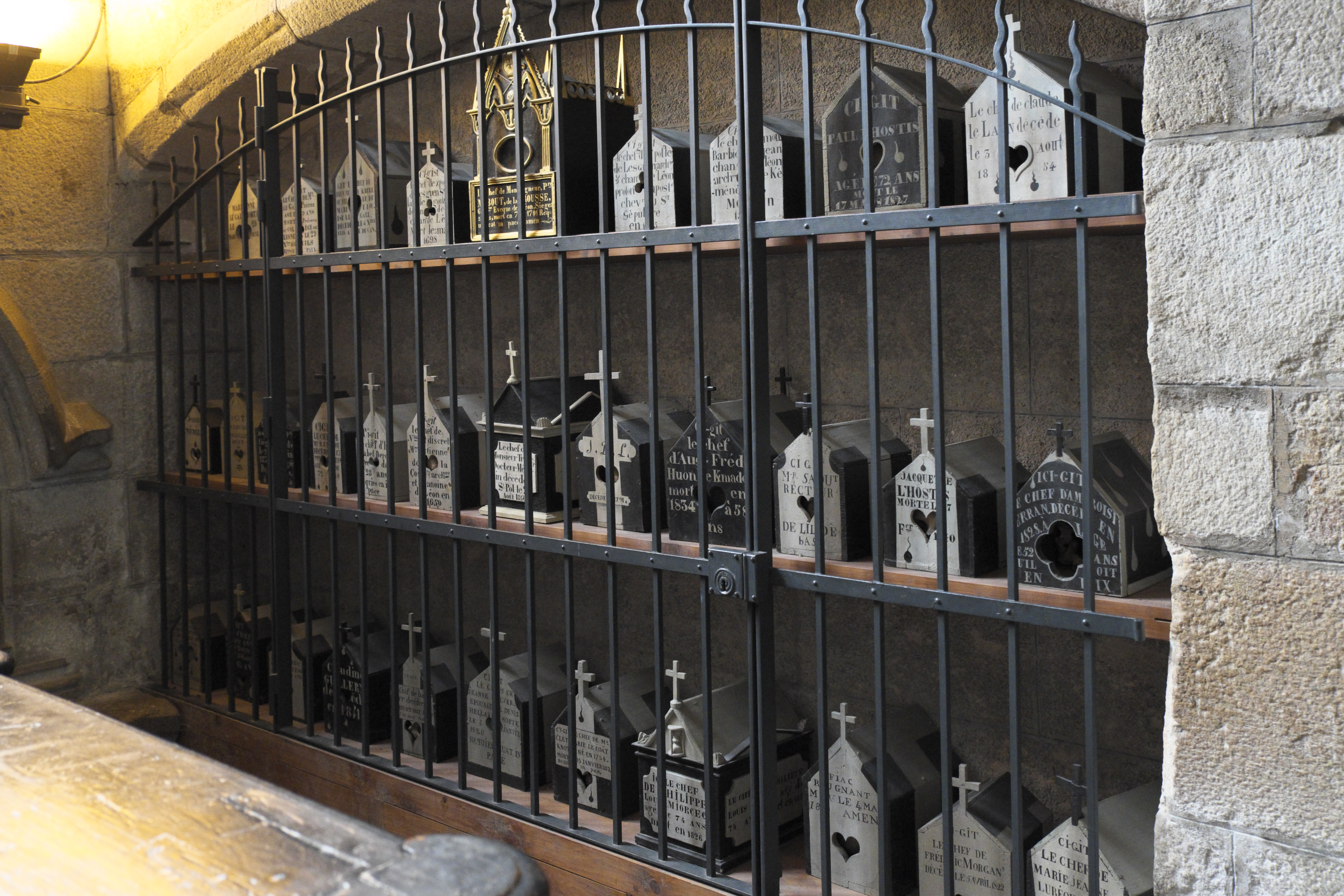 Ehemalige Kathedrale Saint-Paul-Aurélien in Saint-Pol-de-Léon im Département Finistère (Region Bretagne/Frankreich), Regal mit Kästen für die Aufbewahrung von Schädeln (Étagères de la Nuit)